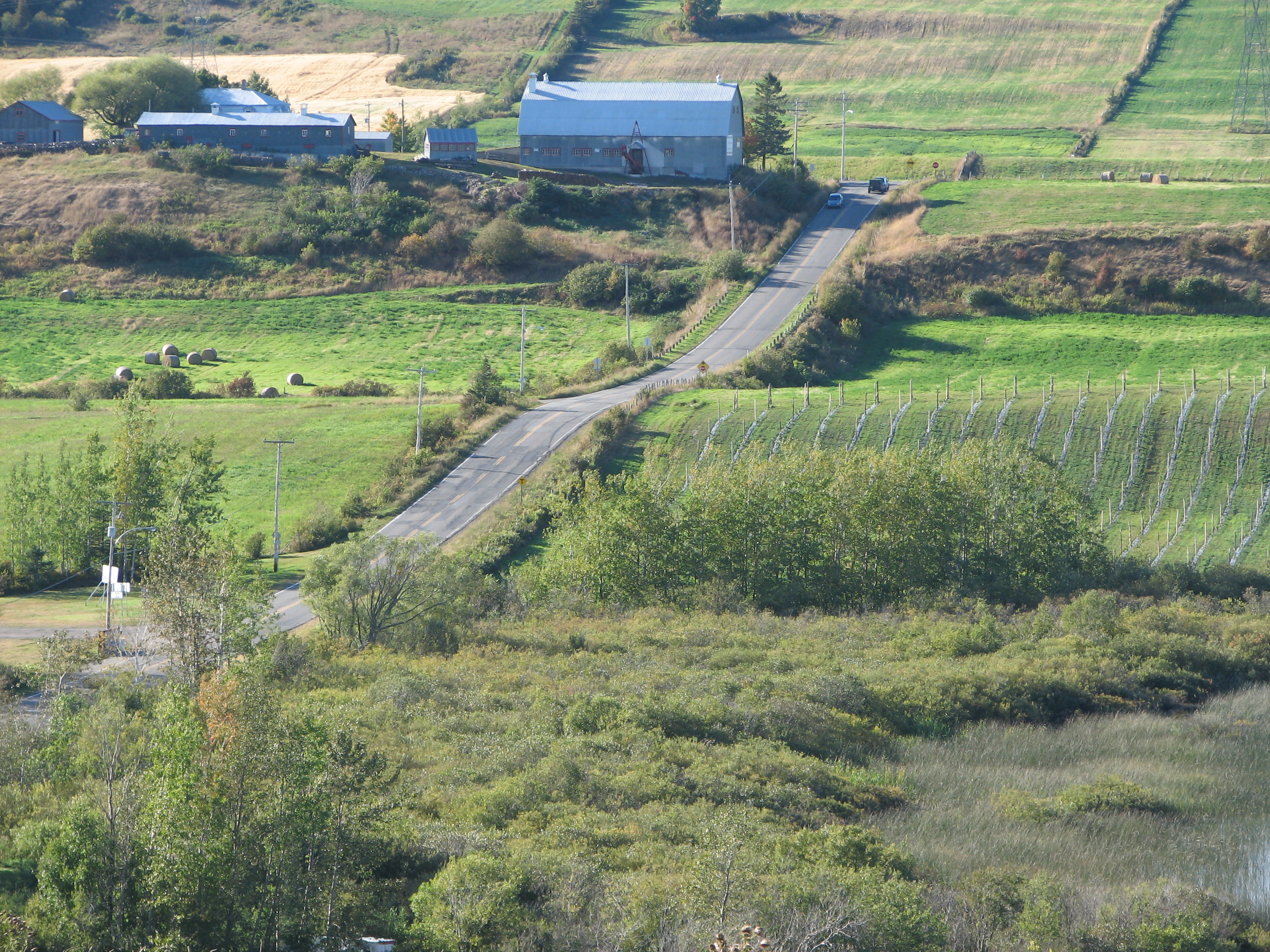 St-Mathieu